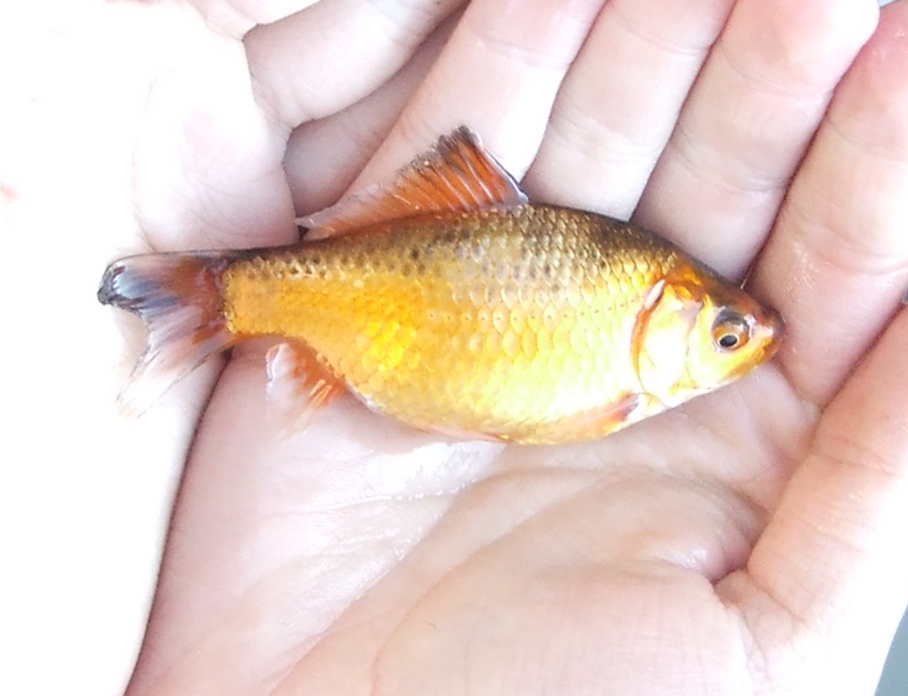 Carassius carassius, golden